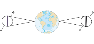 diagram explaining Libration in latitude.